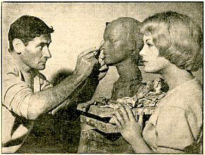 L'actrice Romy Schneider pose pour le sculpteur Marcel Mayer